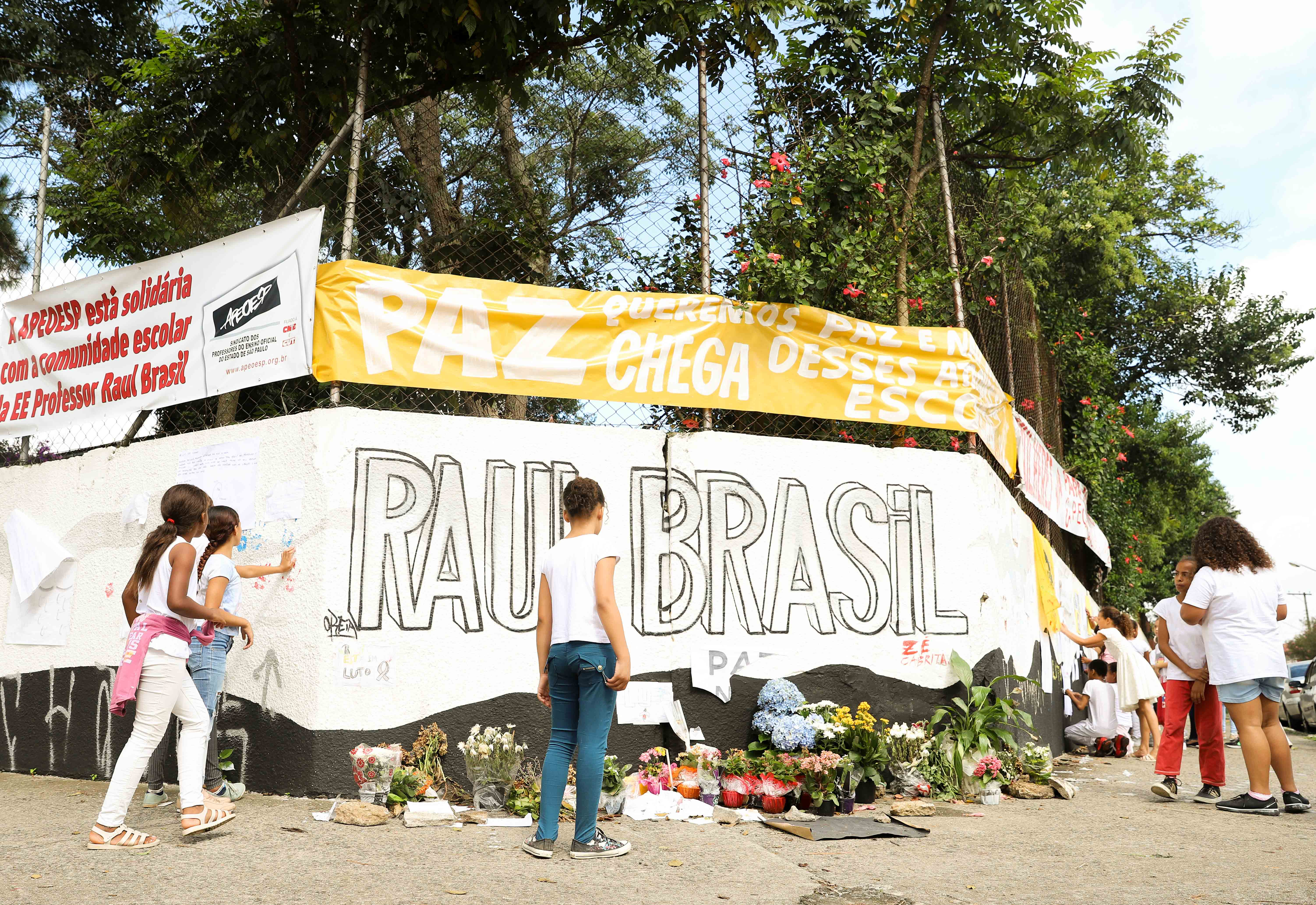 O secretário de Estado da Educação, Rossieli Soares, participa do culto ecumênico realizado na Escola Estadual Professor Raul Brasil, em Suzano. Local: Suzano/SP Data: 20/03/2019 Foto: Governo do Estado de São Paulo